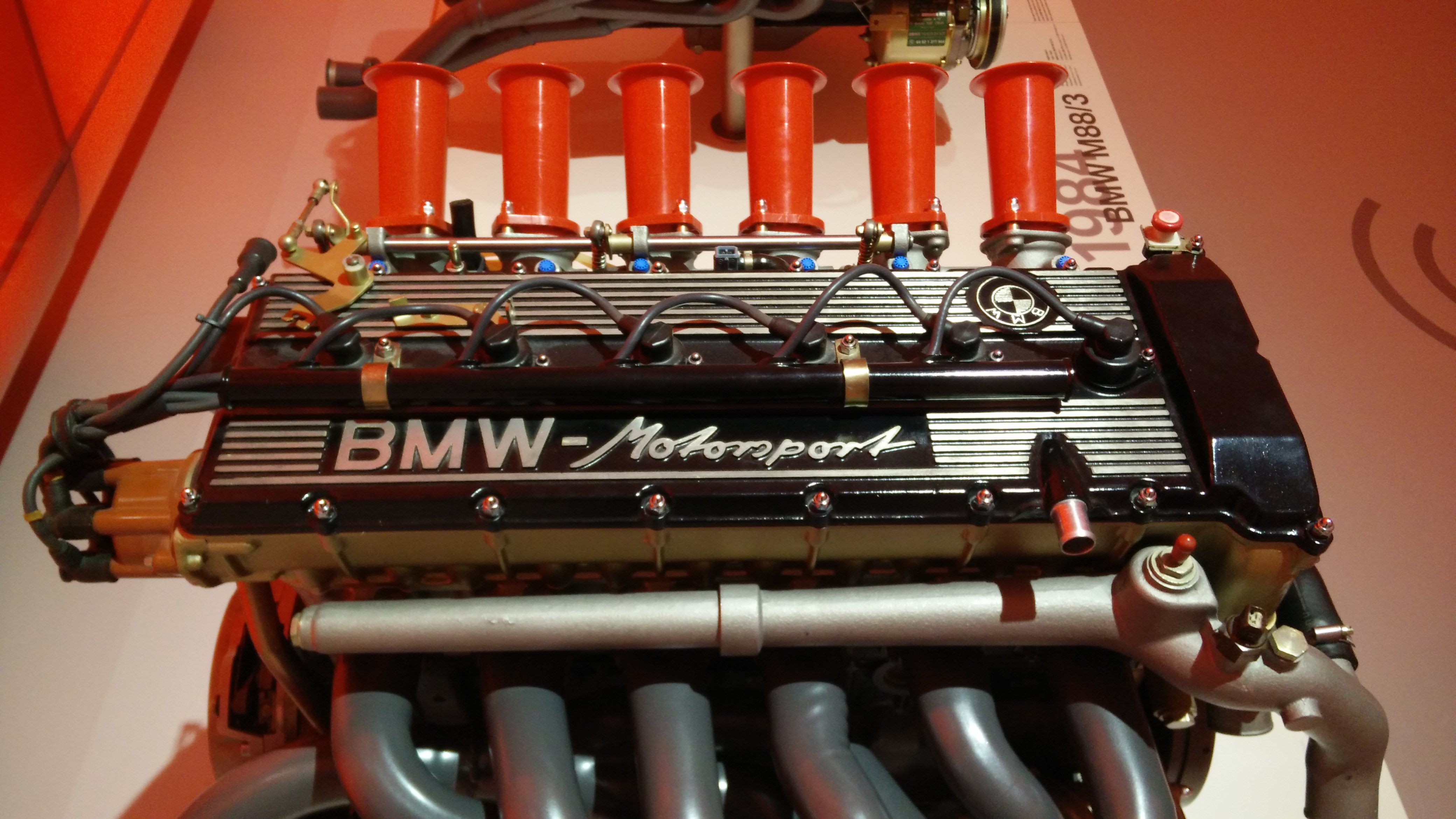 IMG_20141113_115515